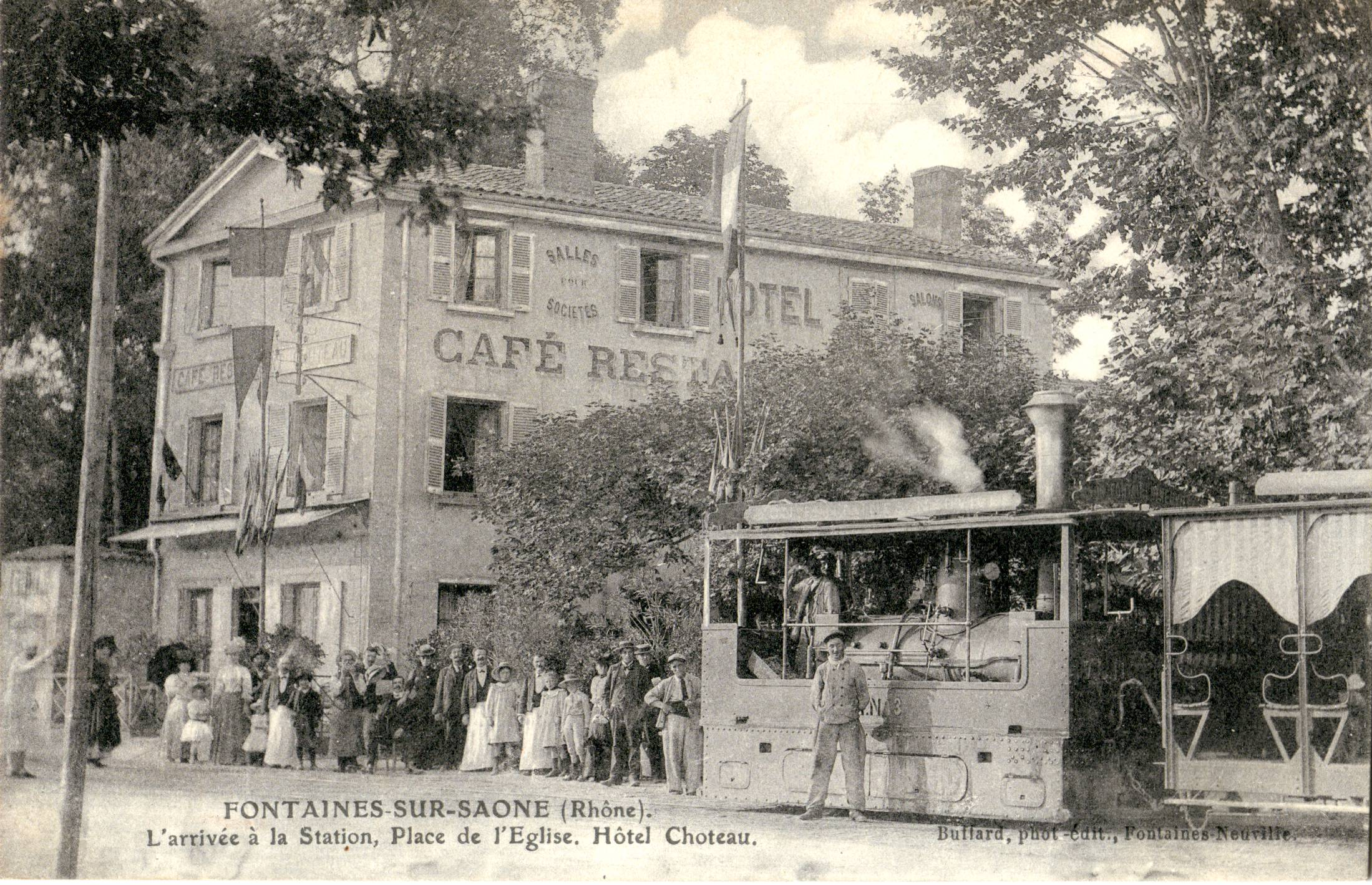 Carte postale ancienne éditée par Buffard, Phot.-édit. à Fontaines Neuville :FONTAINES-SUR-SAÔNE - L'arrivée à la Station, Place de l'Eglise. Hôtel ChoteauVue en gros plan d'une locomotive à vapeur bicabine fornie par SLM Winterthur des TLN (Compagnie du Tramway de Lyon à Neuville et extensions) tractant une rame de tramway.